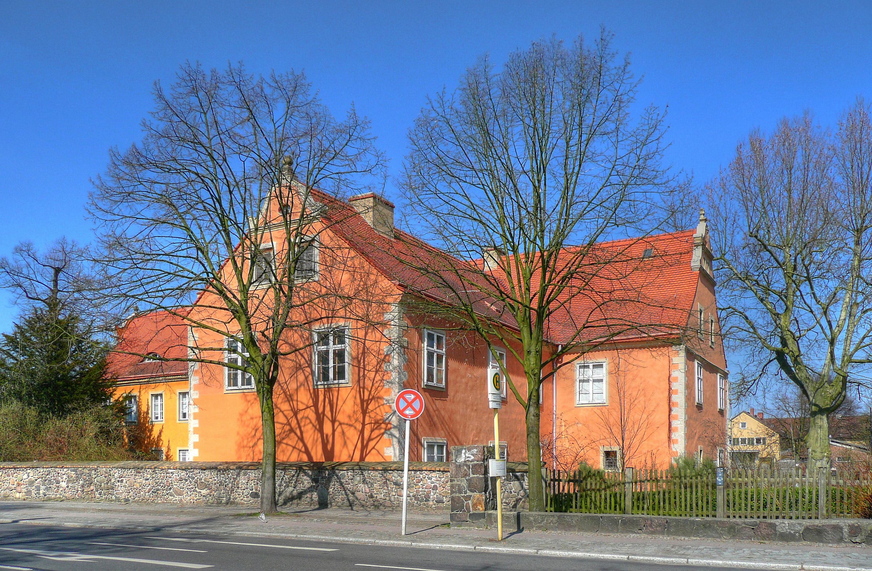 Freilichtmuseum Domäne Dahlem in Berlin-Dahlem